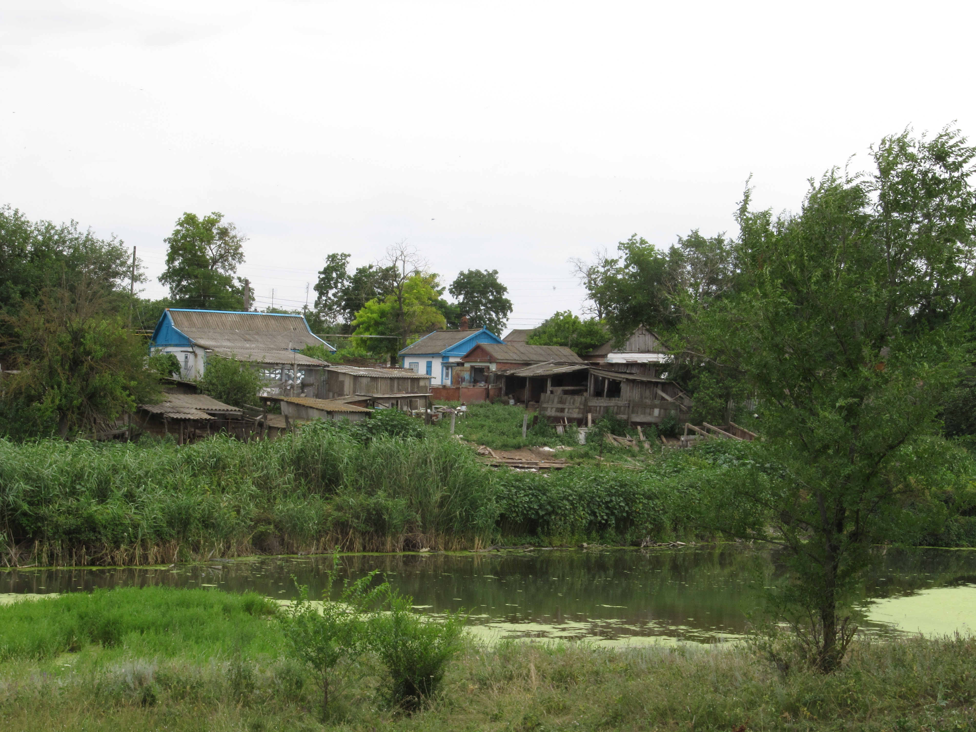 Село Весёлое, Приютненский район, Калмыкия